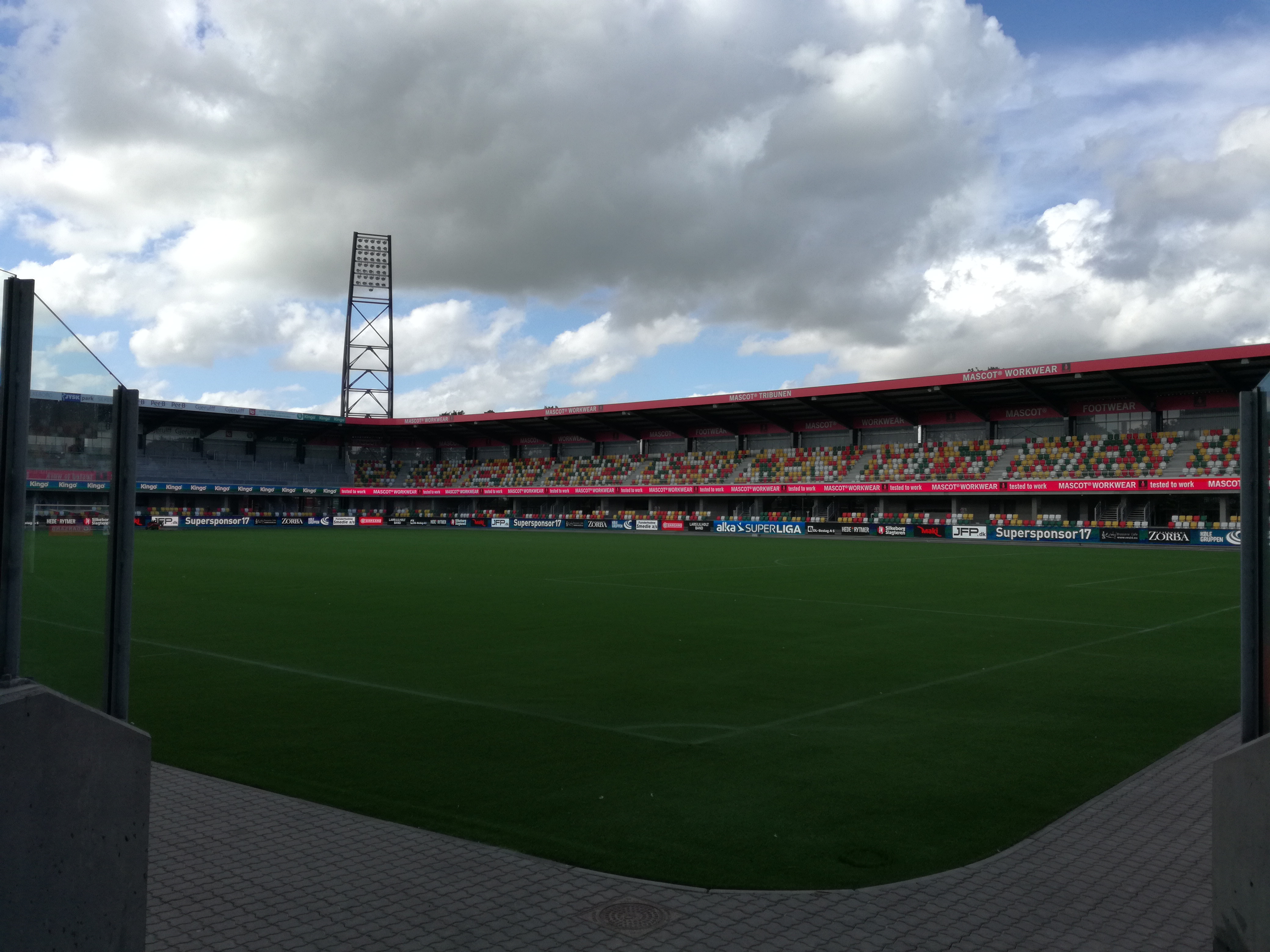 JYSK Park Silkeborg, billede taget fra kanten af banen.